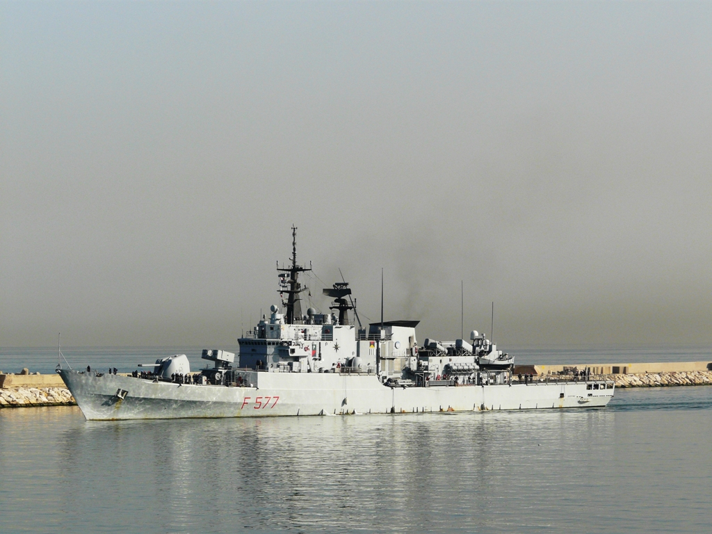 Nave Zeffito nel porto di Beirut nel marzo 2010 impegnata nell'Operazione delle Nazioni Unite UNIFIL, per il pattugliamento e controllo delle acque antistanti il Libano